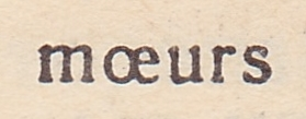 Слово «mœurs» из эпиграфа к четвёртой главе произведения А. С. Пушкина «Пиковая дама».